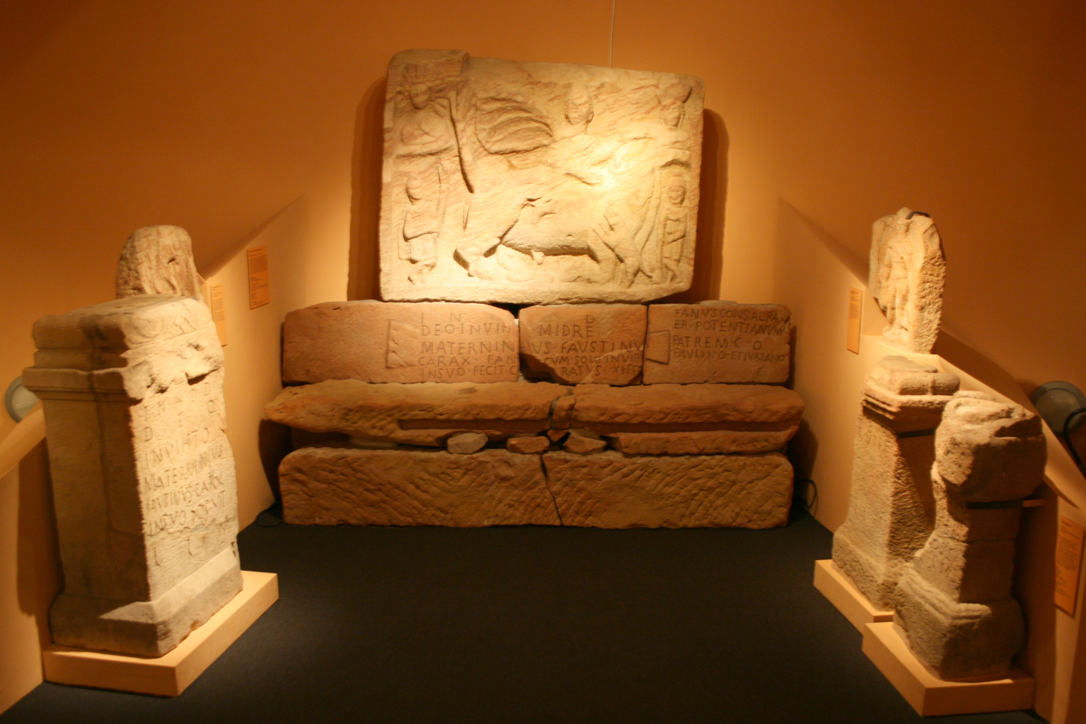 Steindenkmäler aus dem Mithras-Heiligtum in Gimmeldingen, Rheinland-Pfalz. Ausstellung im Historischen Museum der Pfalz in Speyer.